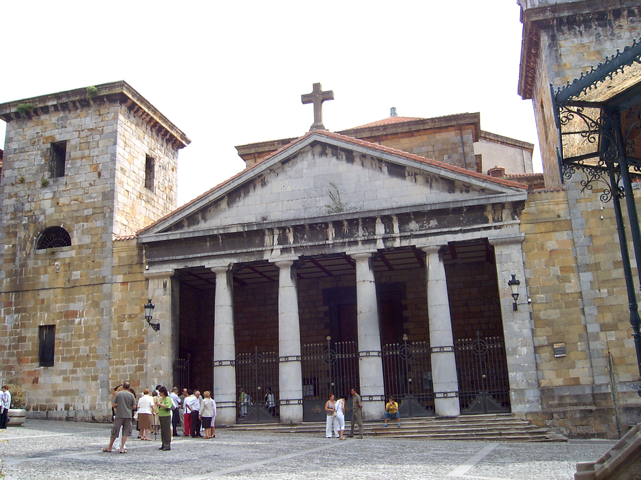 Bermeo Santa Maria church